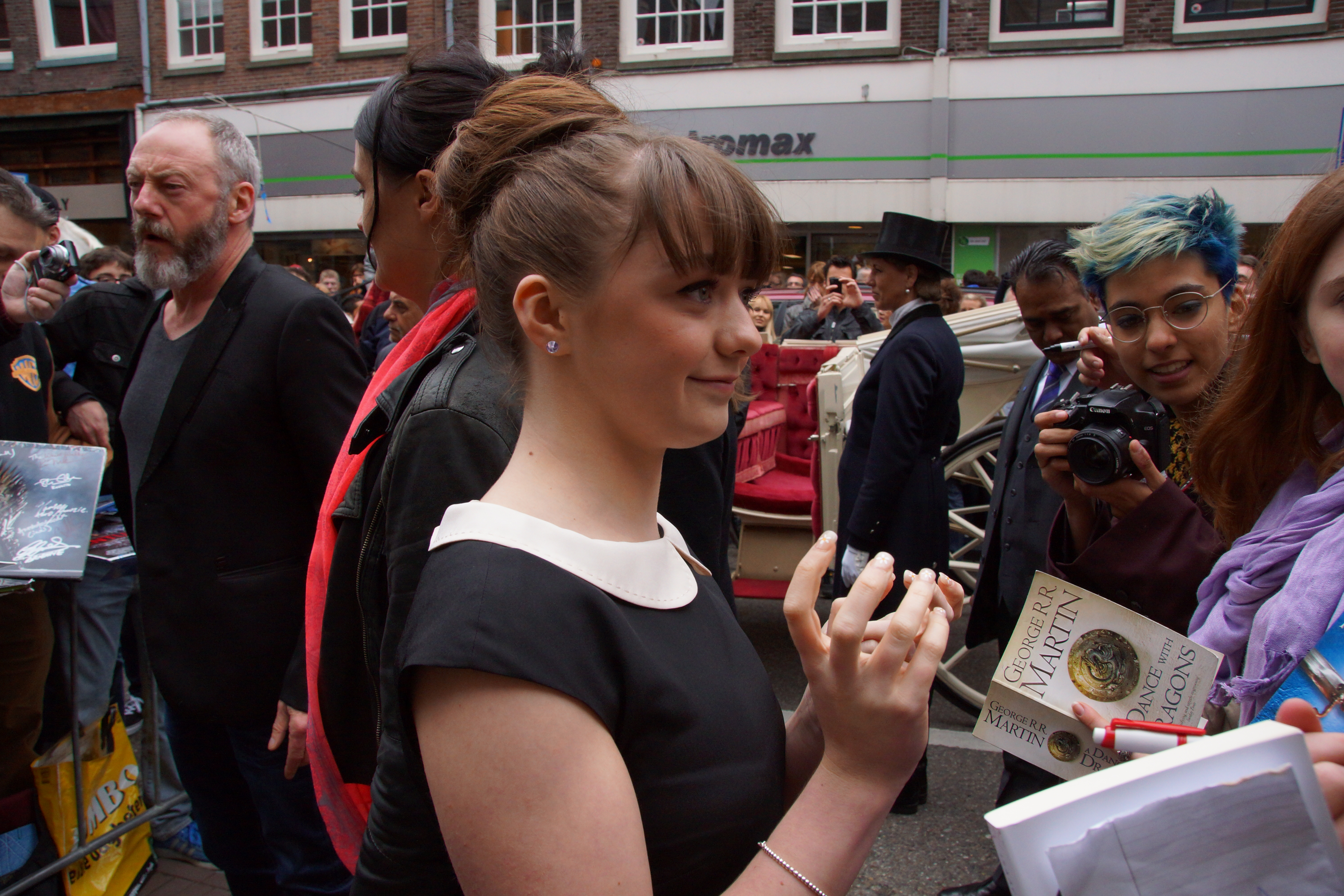 Maisie Williams, 2013